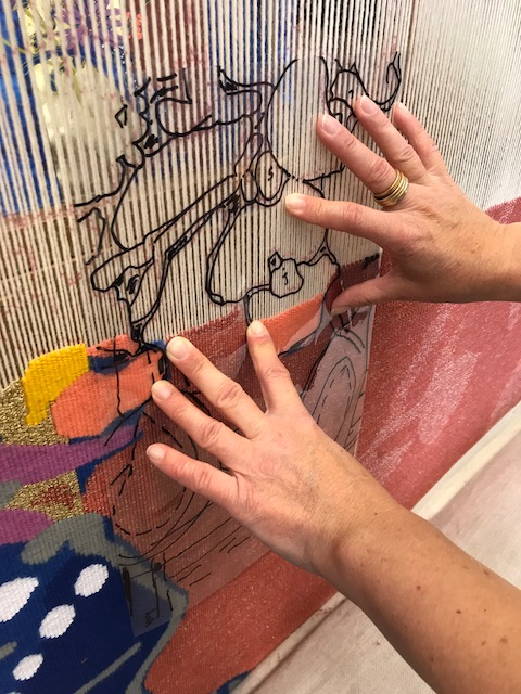 Calque